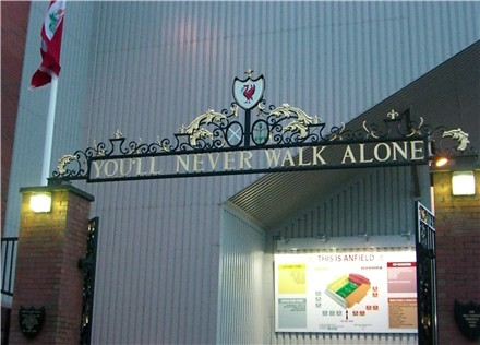 Stadioneingang Anfield